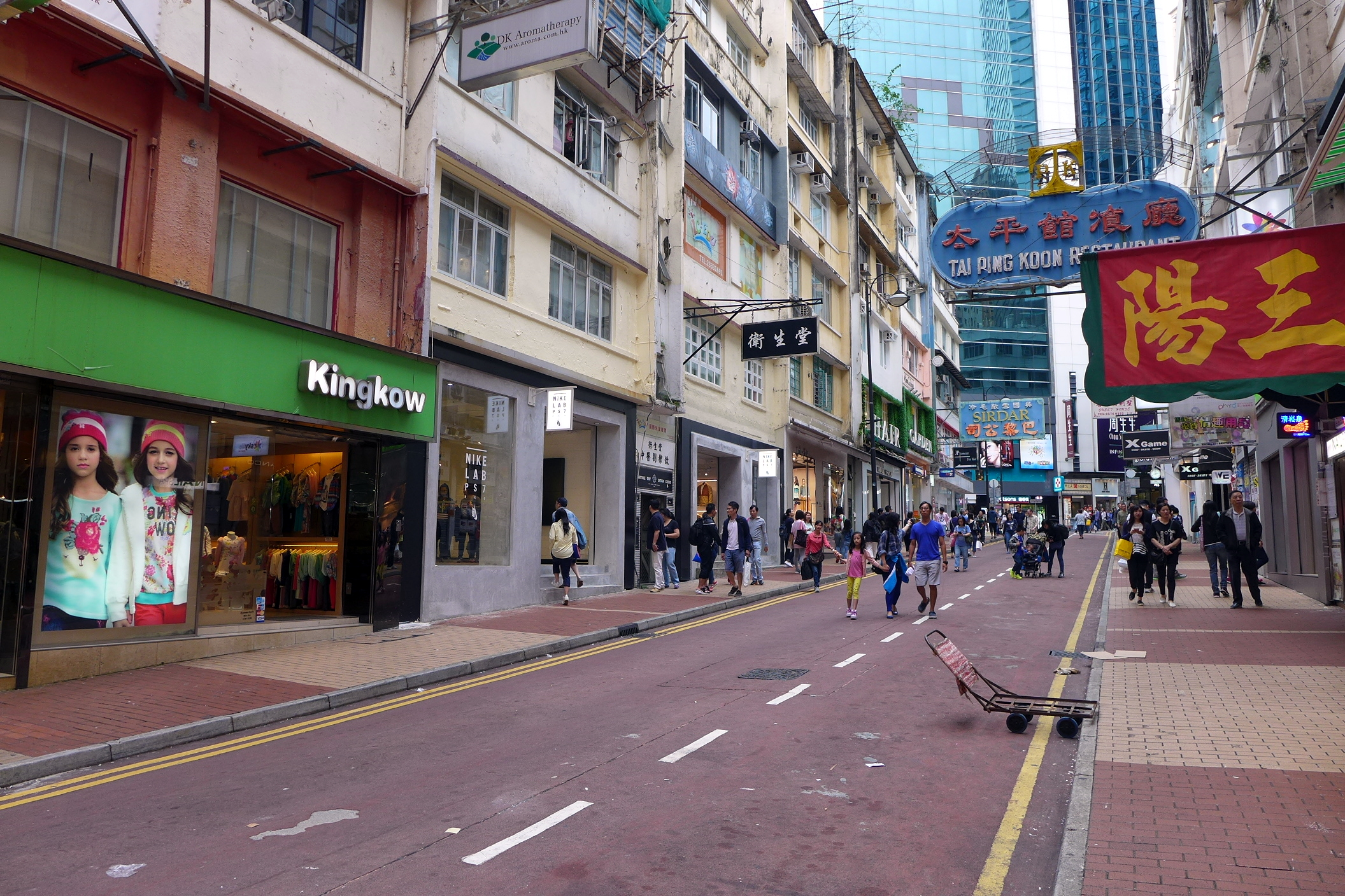 Pak Sha Road